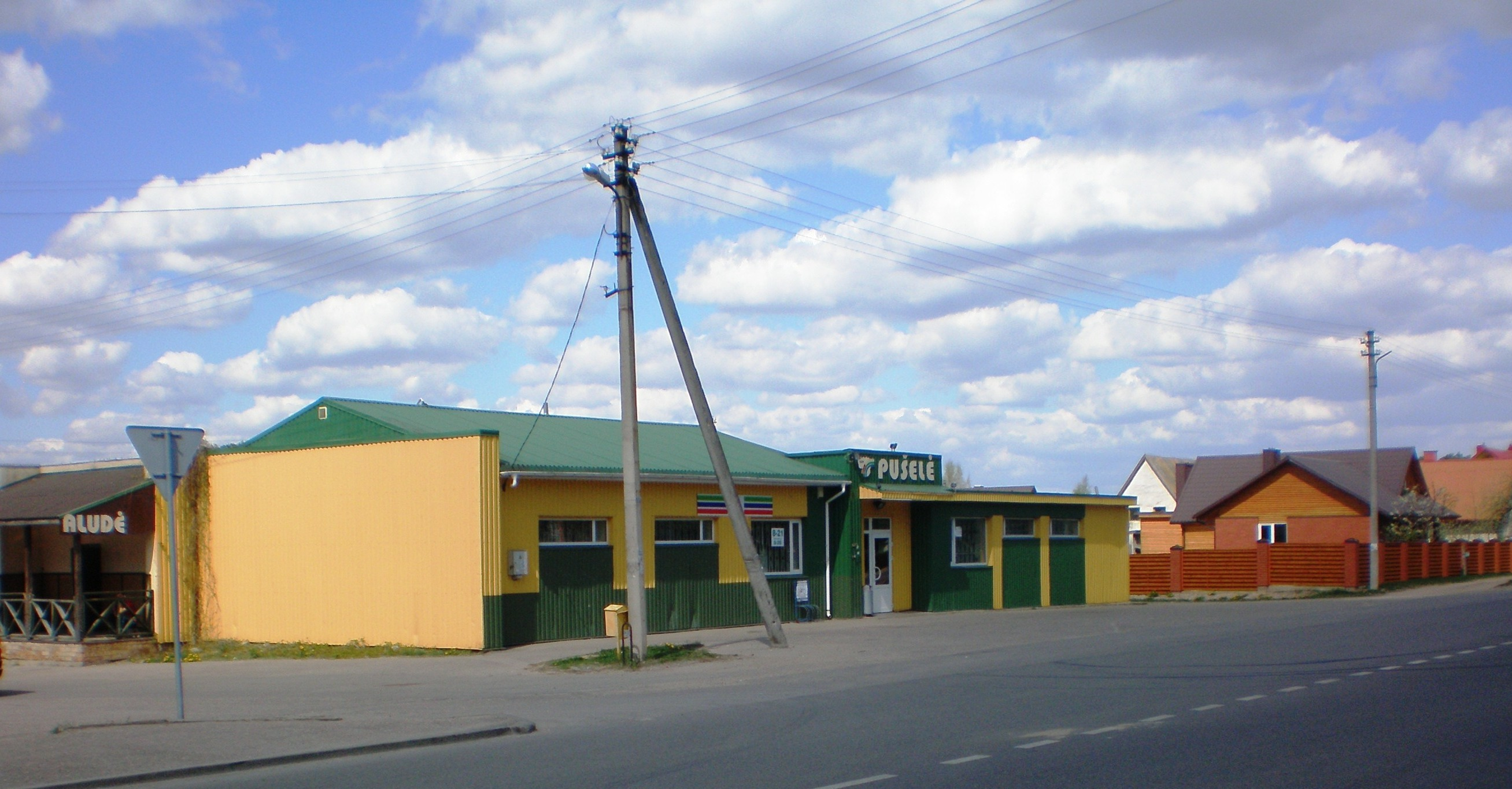 Parduotuvė „Pušelė“, Babėnai, Kėdainiai